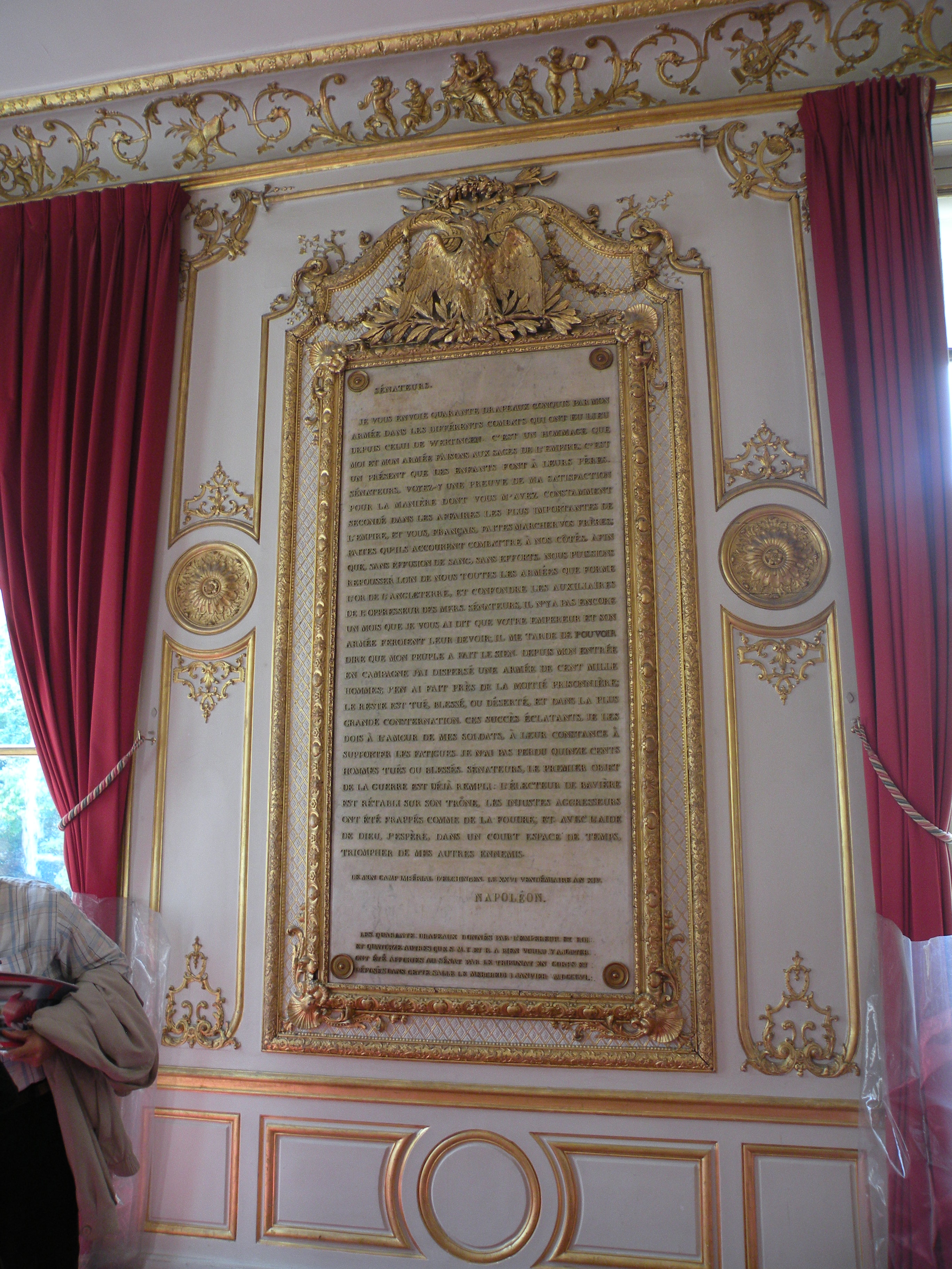 table de marbre recopiant une lettre de napoleon disant aux sénateurs qu'il envoie 40 drapeaux pris à austerlitz 1805, dans la salle Napoleon au petit luxembourg